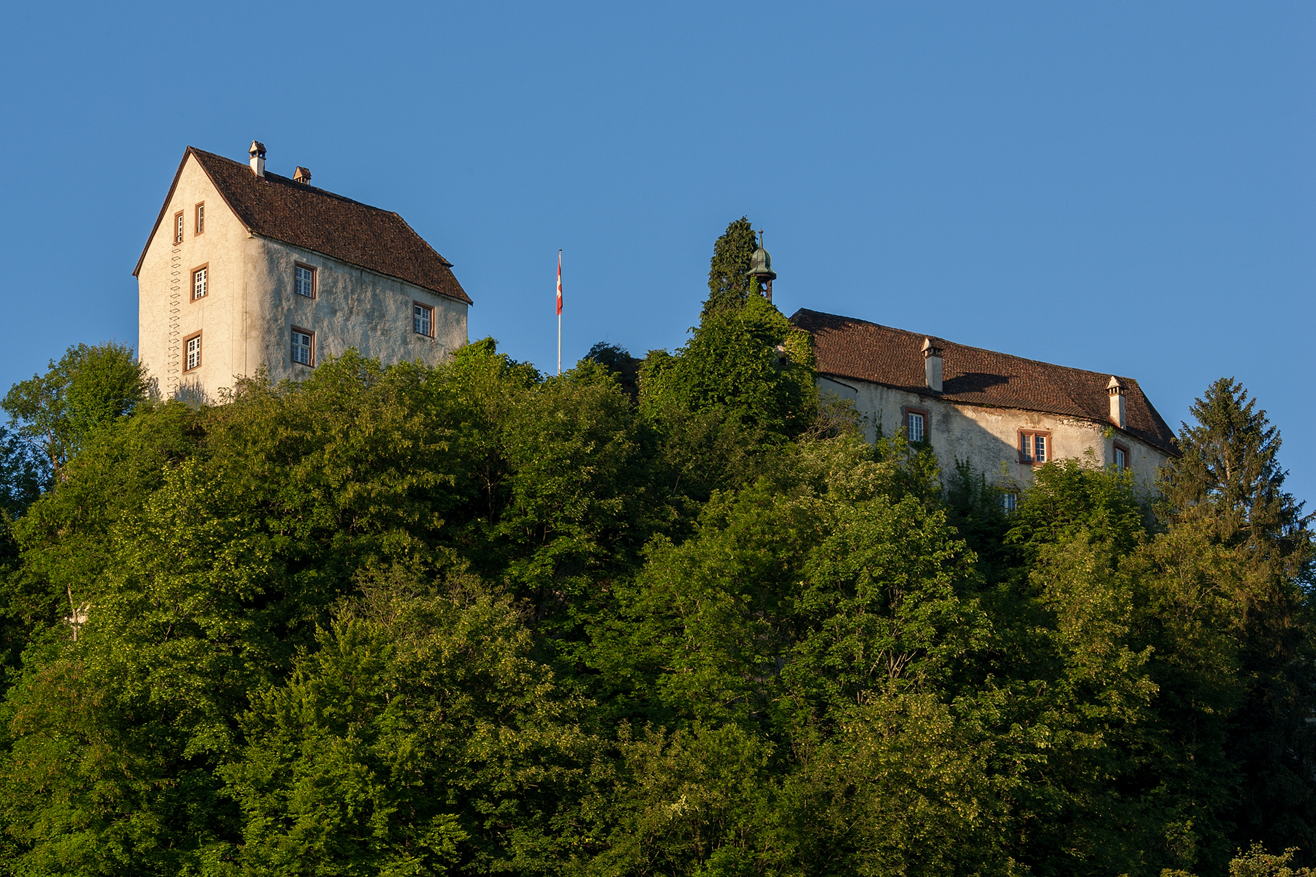 Burg ob Burg (BL)